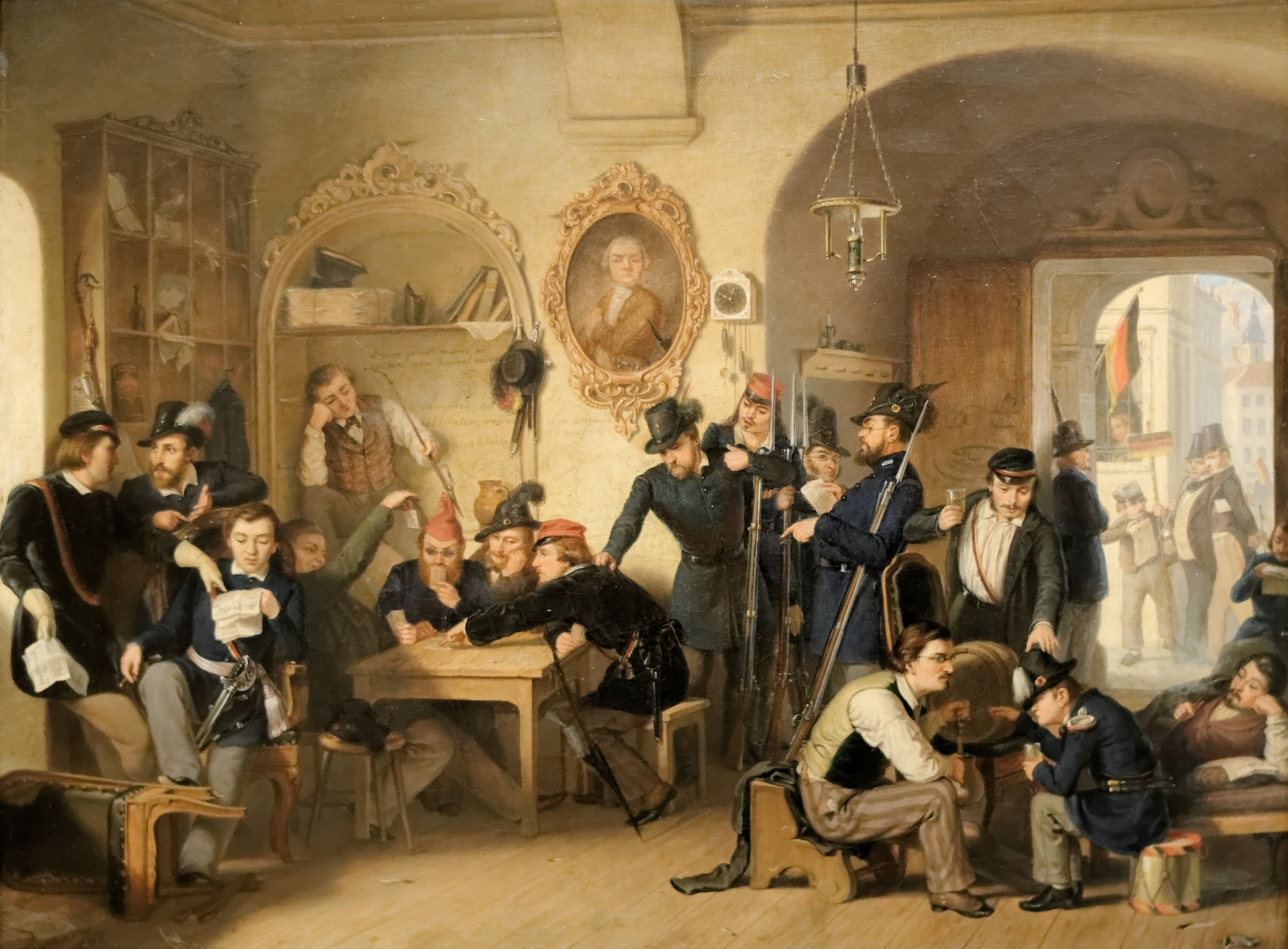 Studentenwachstube der Akademischen Legion in der Aula der alten Universität im Jahre 1848 – Franz Schams (1824-1883) Die Studenten waren die Triebfeder der Revolution, und die Aula der alten Universität (heute Akademie der Wissenschaften) wurde immer mehr zum Zentrum der revolutionären Bewegung